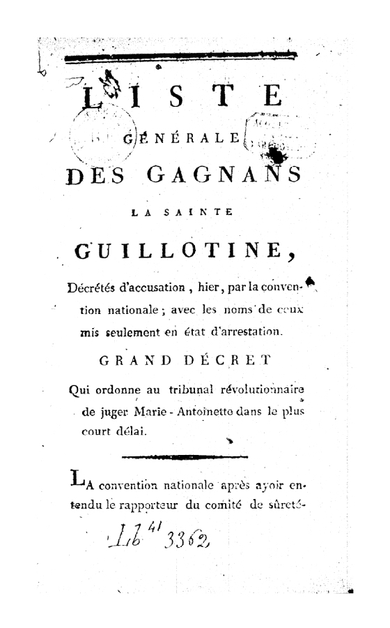 première page de l'opuscule "Liste des gagnans sainte Guillotine..."